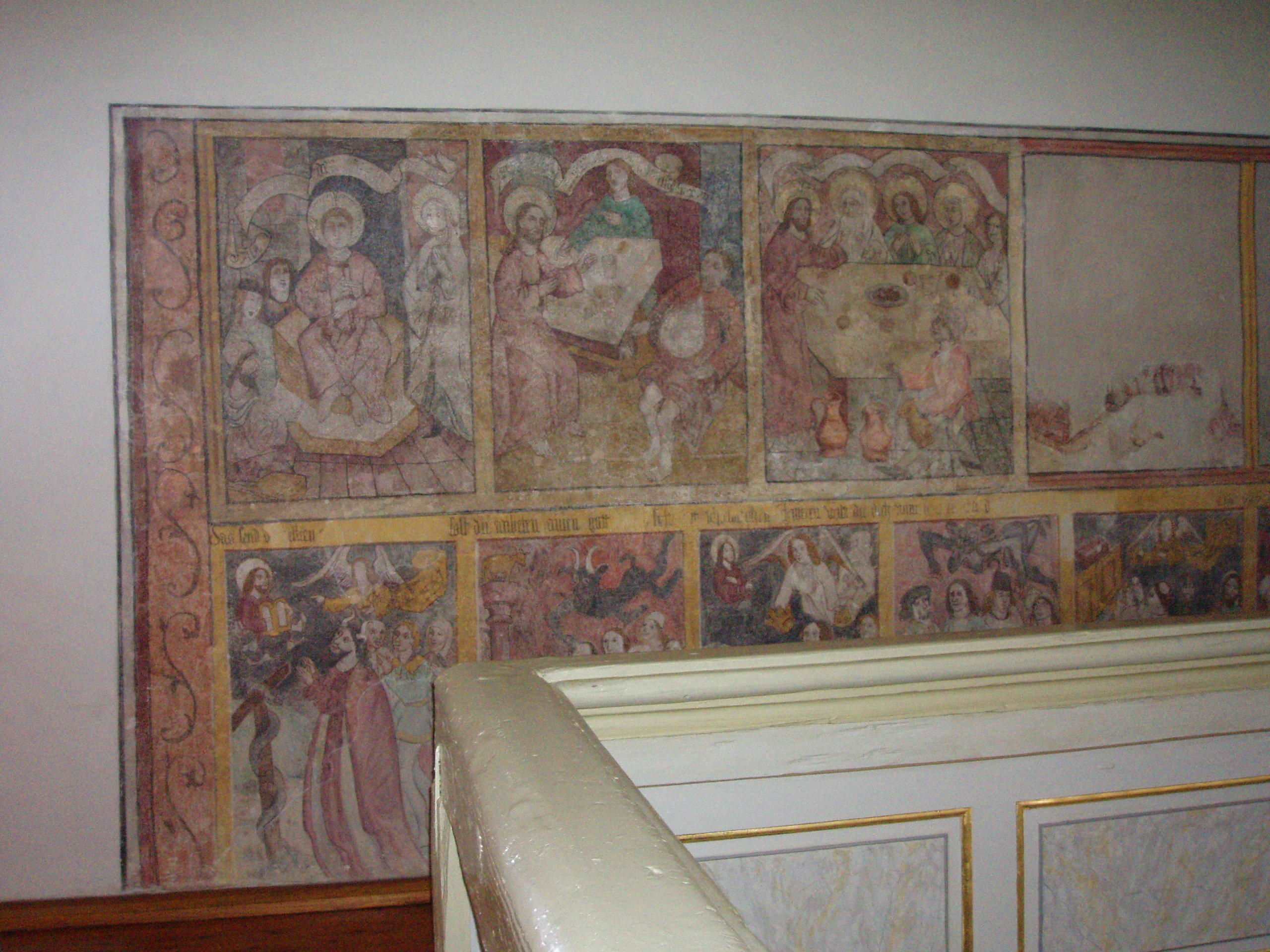 Wandmalereien in St. Cyriakus, Dürnau